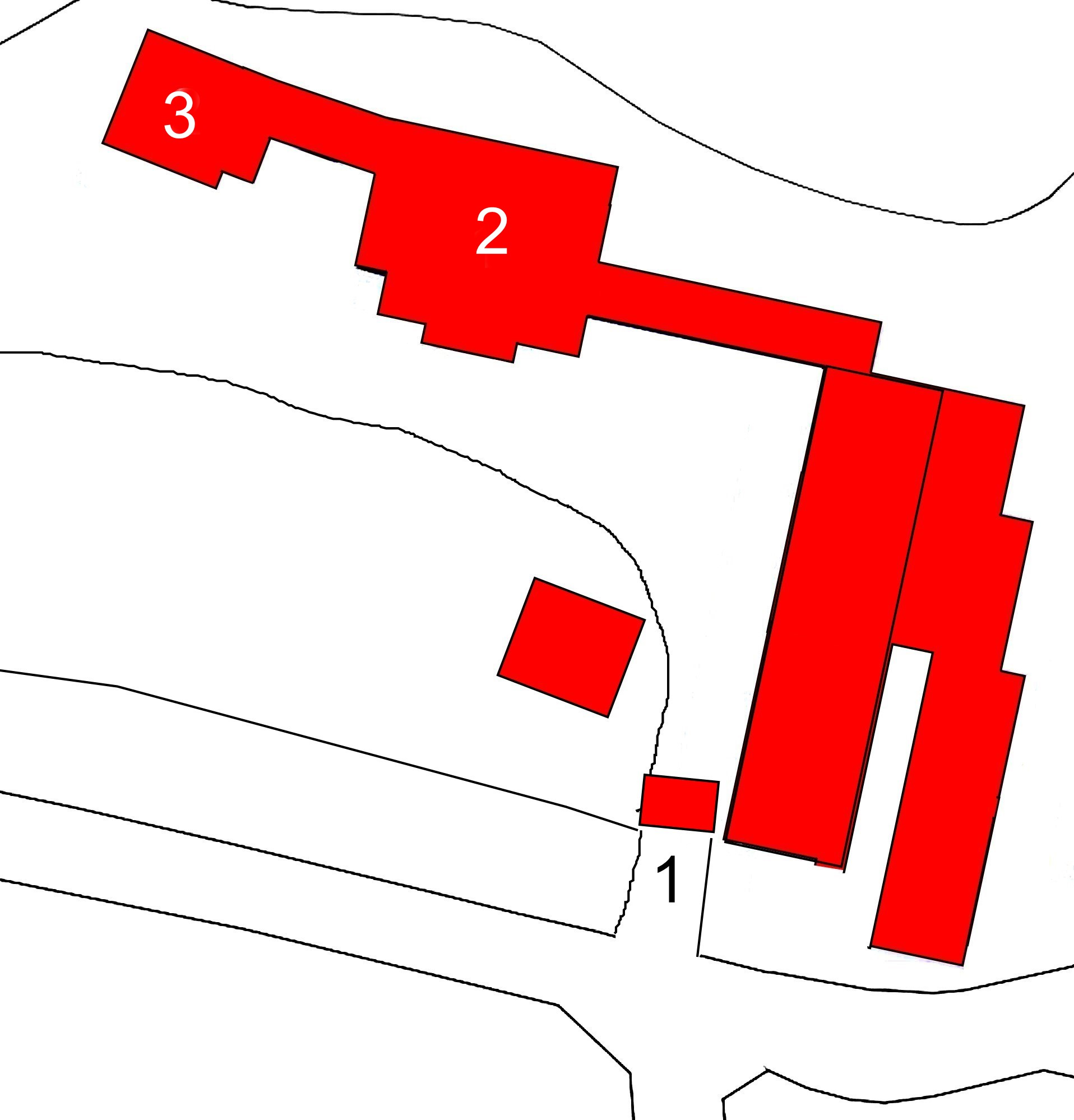 Layout of Jûraku-ji at Awa